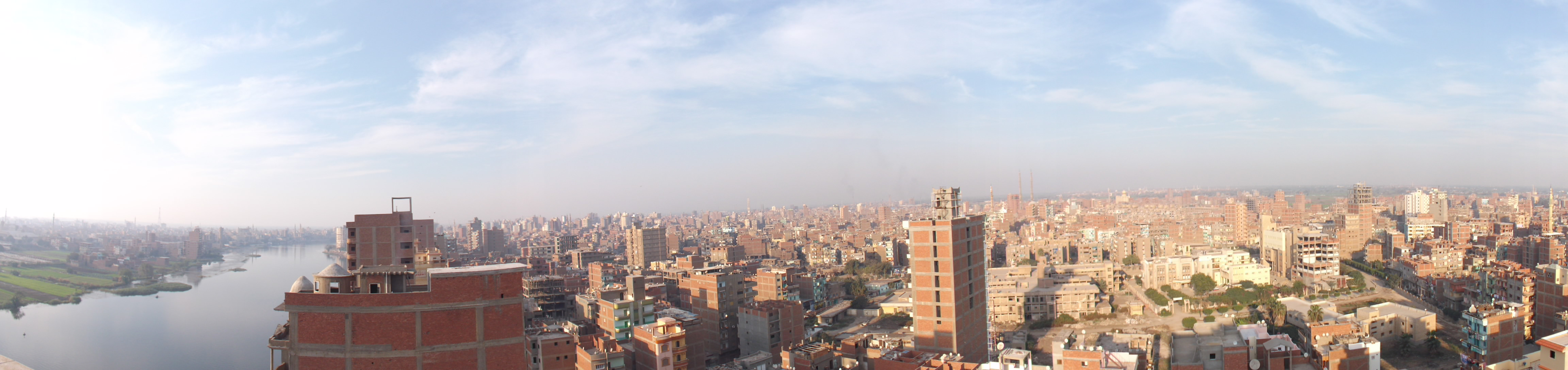 مدينة ميت غمر من اعلى برج عابدين شارع الكورنيش ارض الجزيرة